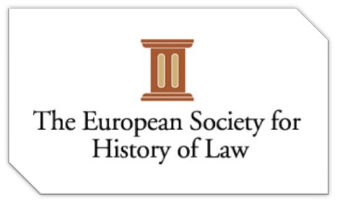 Logo - The European Society for History of Law umožňuje co nejširší zejména právnické veřejnosti poznat v oblasti právní praxe historické souvislosti současné i budoucí právní úpravy jednotlivých institutů. Umožní právníkům v právní praxi zprostředkovat a přiblížit dobové názory na některé právní problémy a dnes již zapomenutou judikaturu